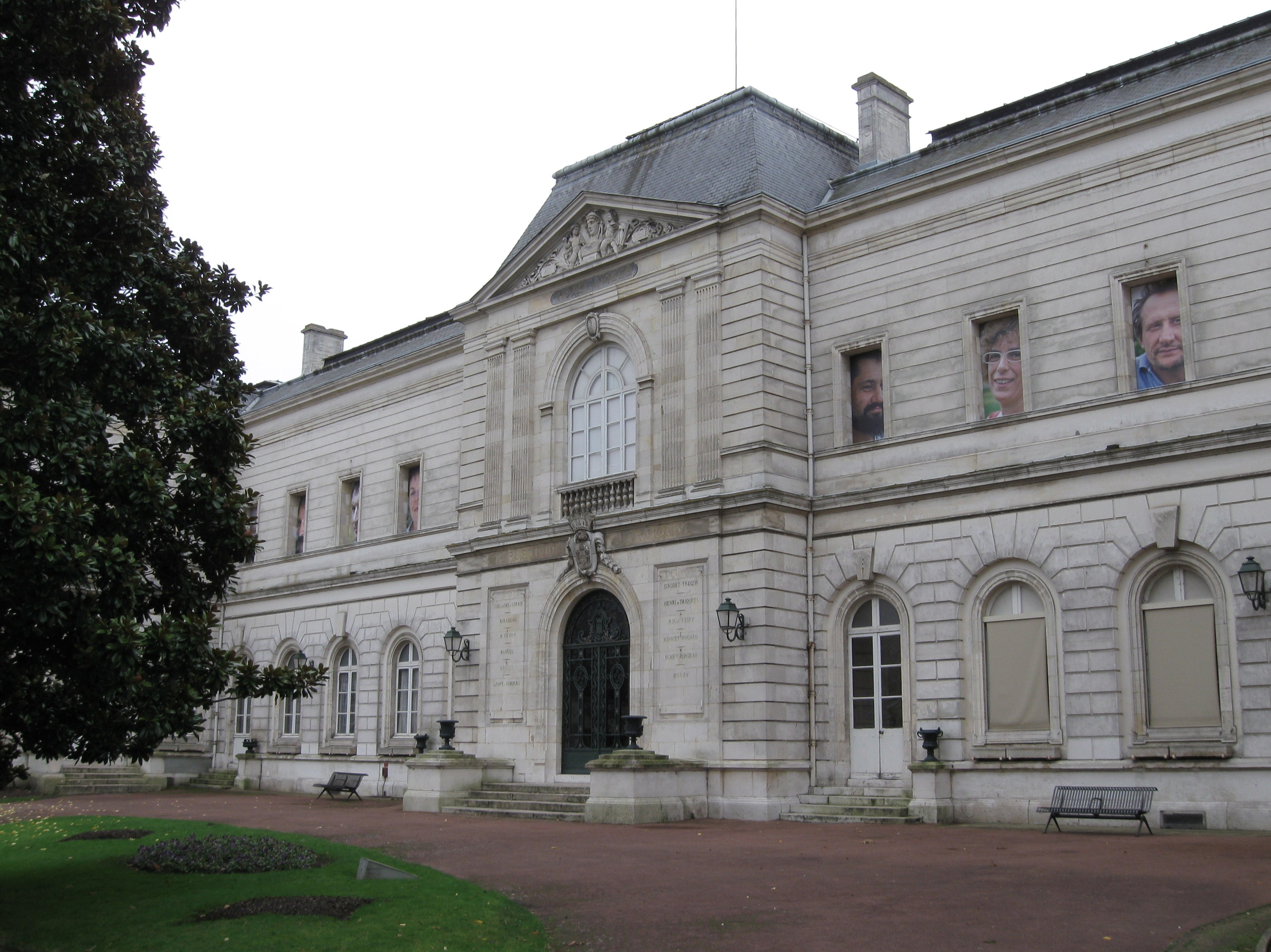 Hôtel Durzy (musée Girodet), Montargis, Loiret, France